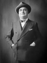 Angelo Rizzoli est un producteur de cinéma et un éditeur italien, né le 31 octobre 1889 à Milan, ville où il est mort le 24 septembre 1970